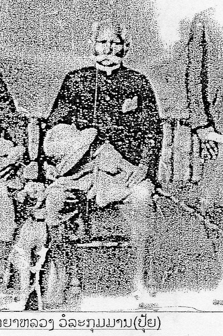 ລາວ: ຍາຫລວງວໍລະກຸມານ (ປຸ້ຍ) ຄ.ສ.໑໙໒໐